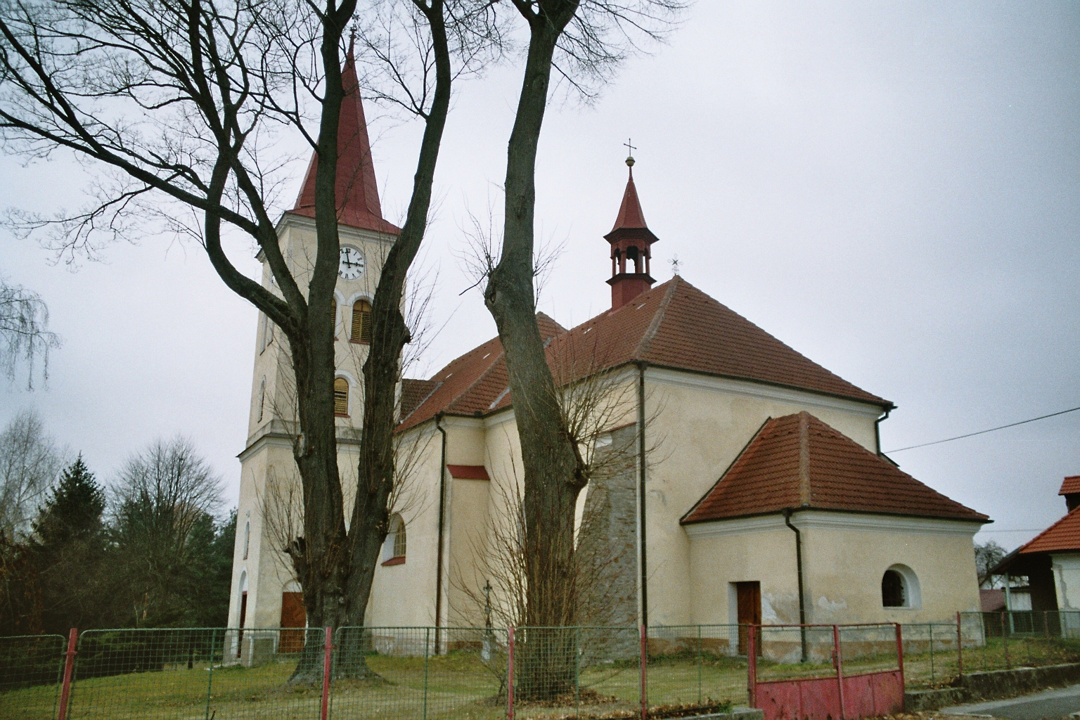 Kostel svatého Václava, Cetoraz, okres Pelhřimov, Czech republic